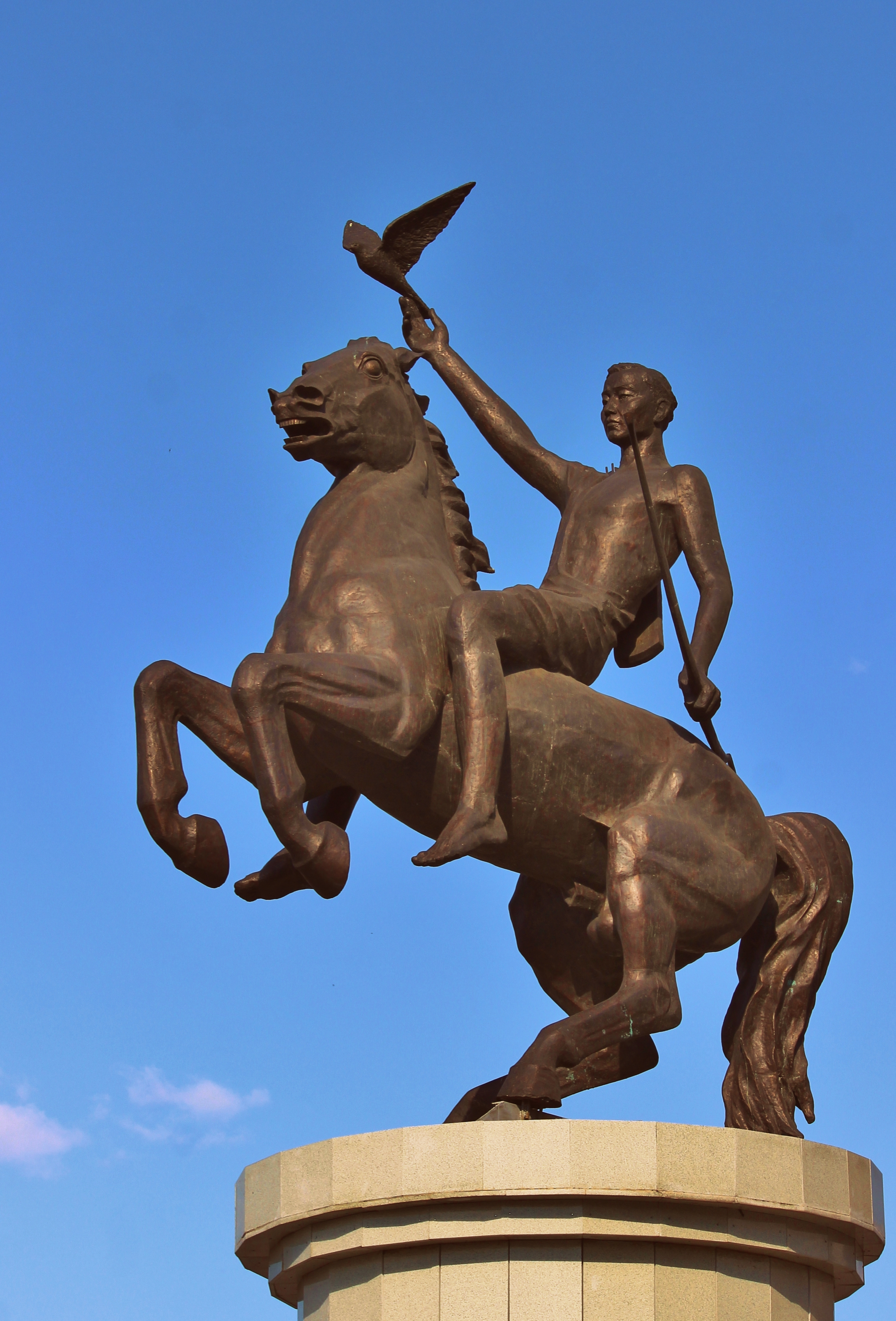 Скульптура "Юность Бурятии" на пересечении улиц Борсоева и Смолина"